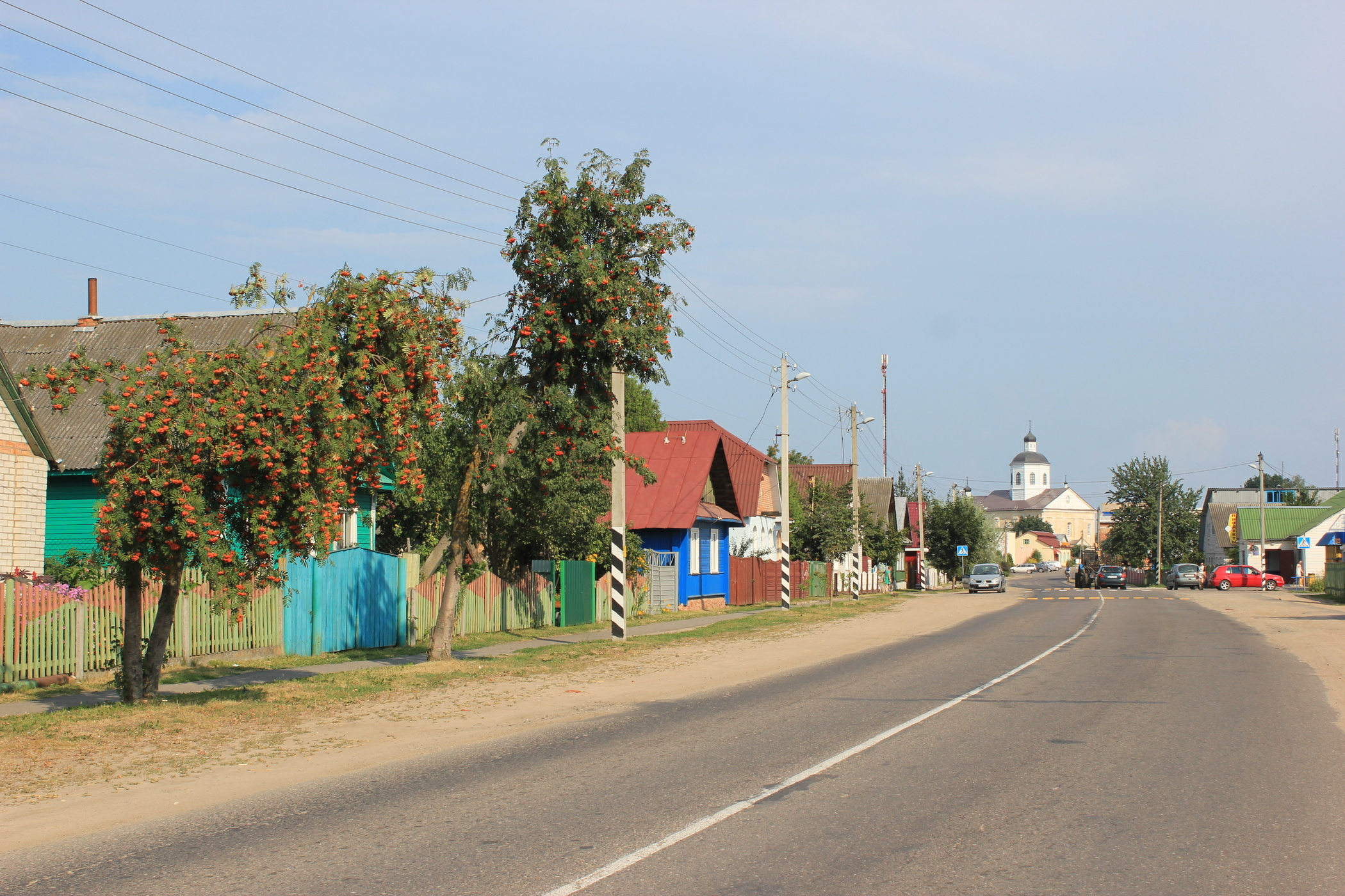 Straßenszene in Rakaŭ, Belarus.